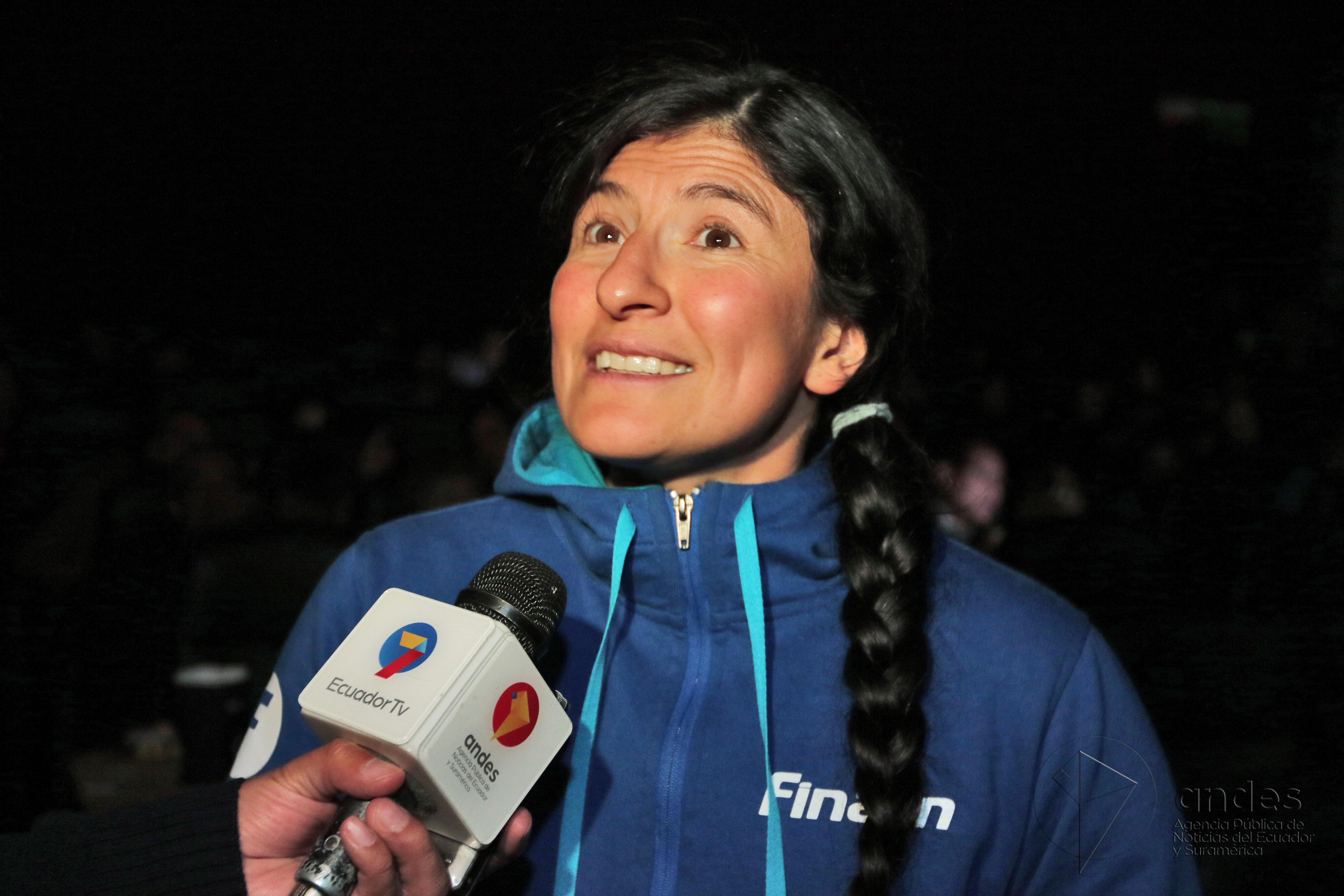 Carla Pérez en 2017